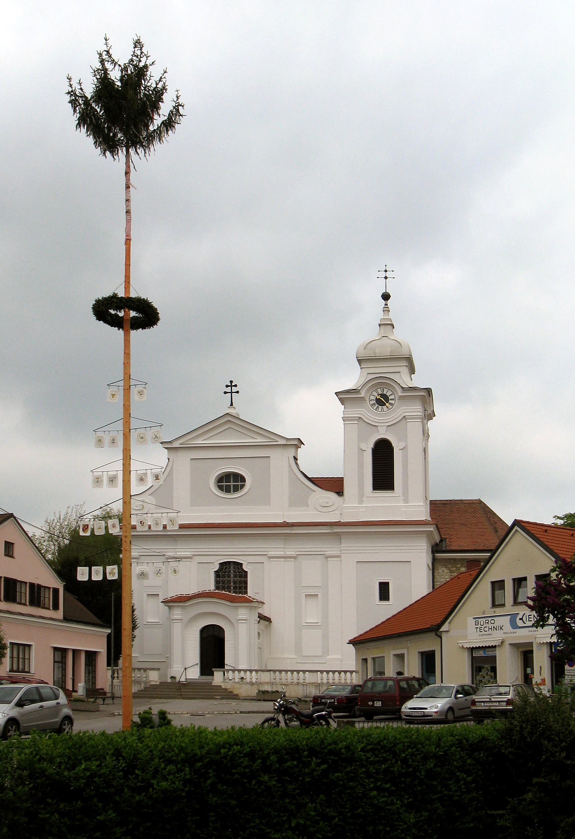 Kath. Pfarrkirche hl. Nikolaus in Wilfersdorf, Bezirk Mistelbach, Niederösterreich